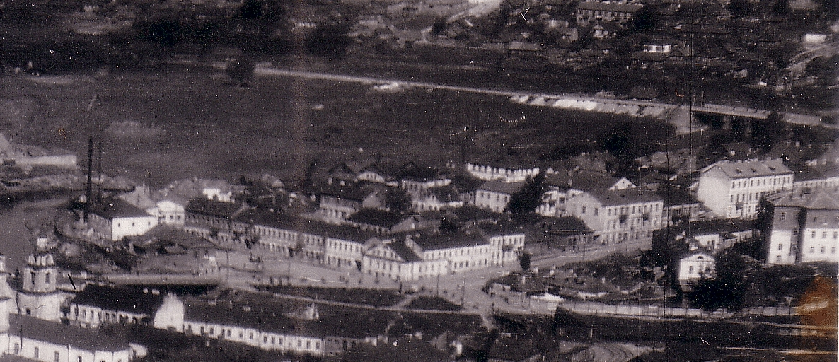 Беларуская (тарашкевіца): Менск (Miensk), Высокае Места (Vysokaje Miesta)